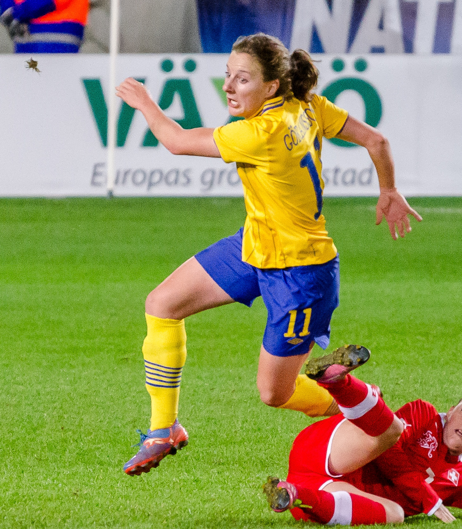 Sveriges Antonia Göransson i den första landskampen på Myresjöhus Arena (tillika Pia Sundhages debut som svensk förbundskapten) 23 oktober 2012, där Sverige slog Schweiz med 3-0 inför 4905 åskådare.